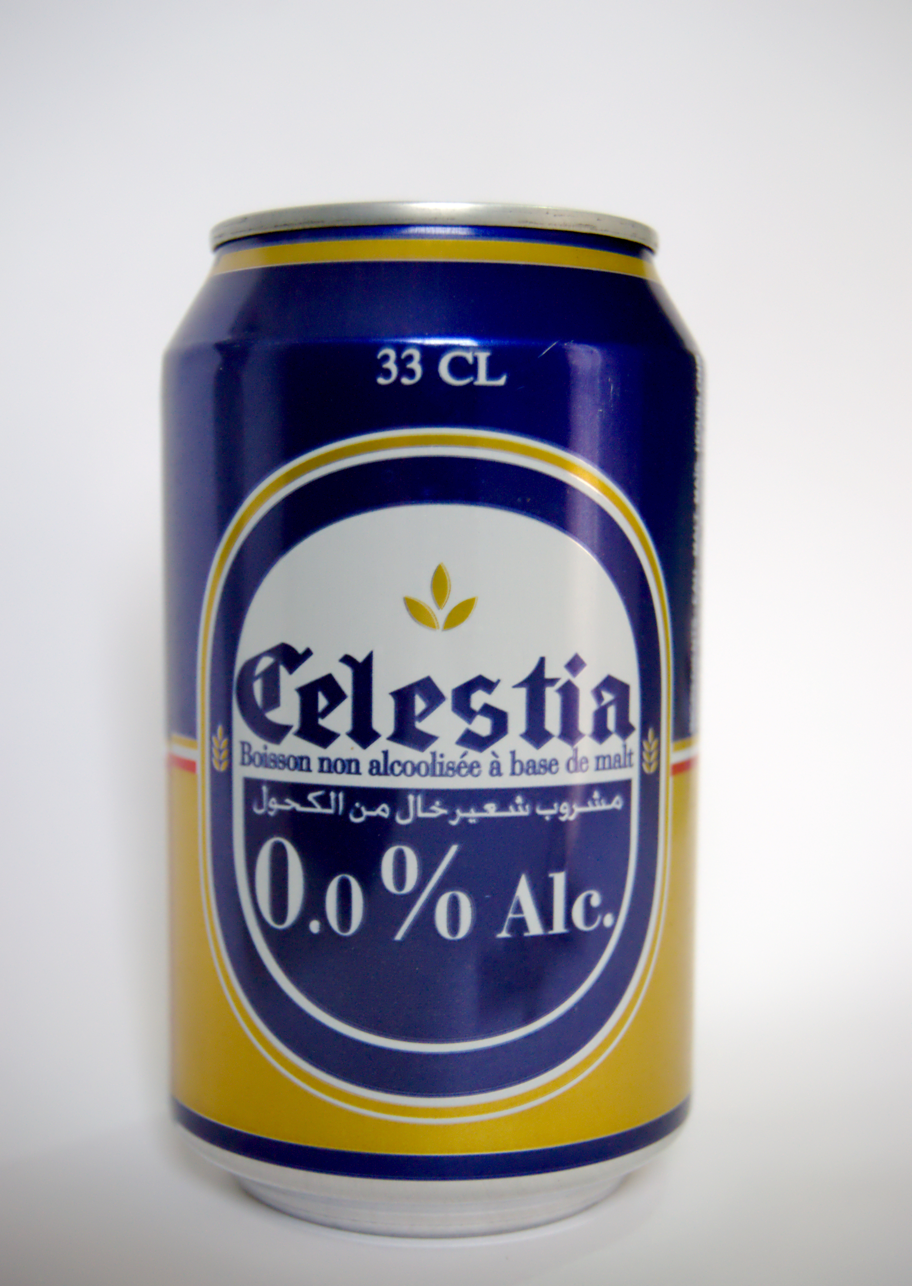 Canette de bière sans alcool de Tunisie This photograph was taken with a Nikon D3100.